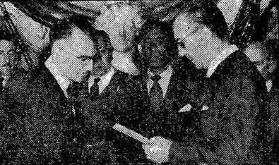 Jura de Luis María de Pablo Pardo como ministro del interior del dictador Lonardi.